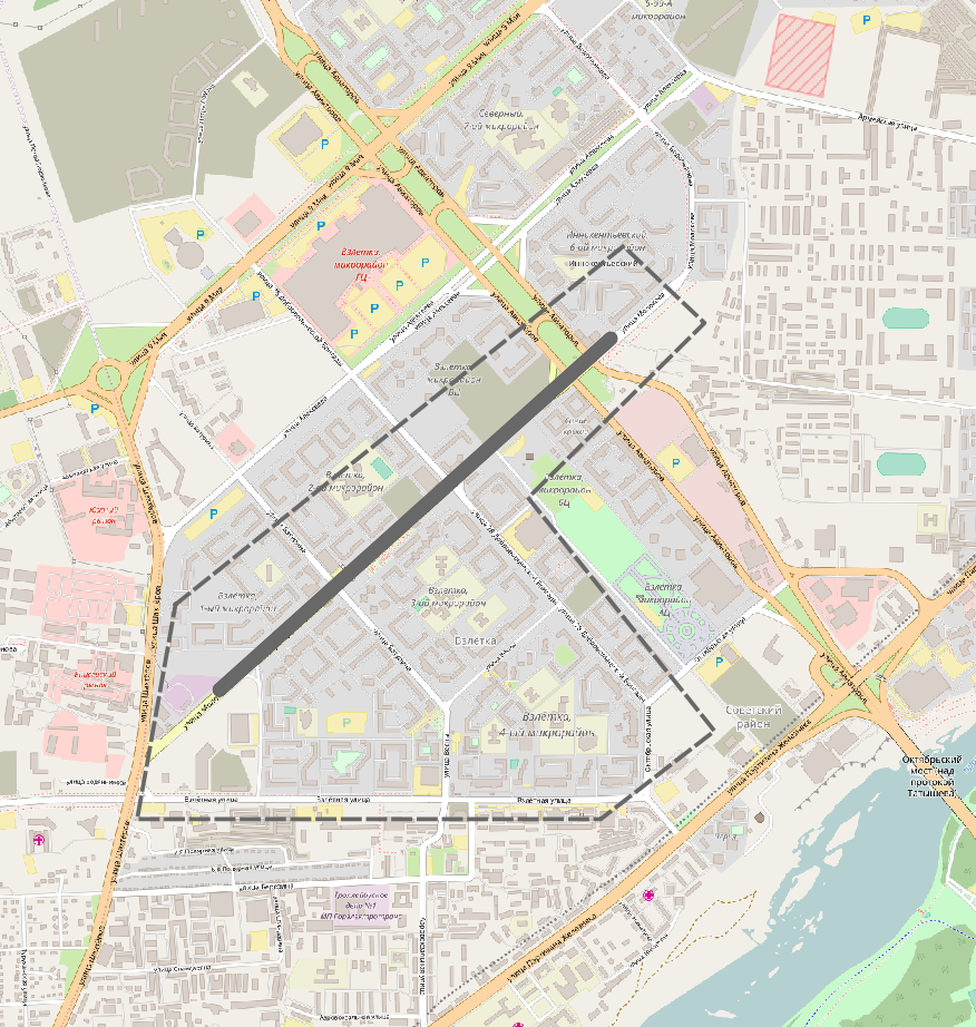 Территория бывшего аэродрома Красноярск-Северный 1980-х годов наложенная на карту 2017 года. Границы территории оцифрованы по космоснимку Landsat-5 10.07.1989, This map may be incomplete, and may contain errors. Don't rely solely on it for navigation.